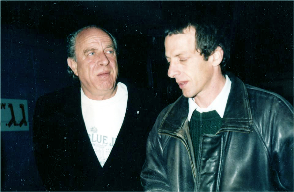 המפיקים עידו צוקרמן וישראל רינגל